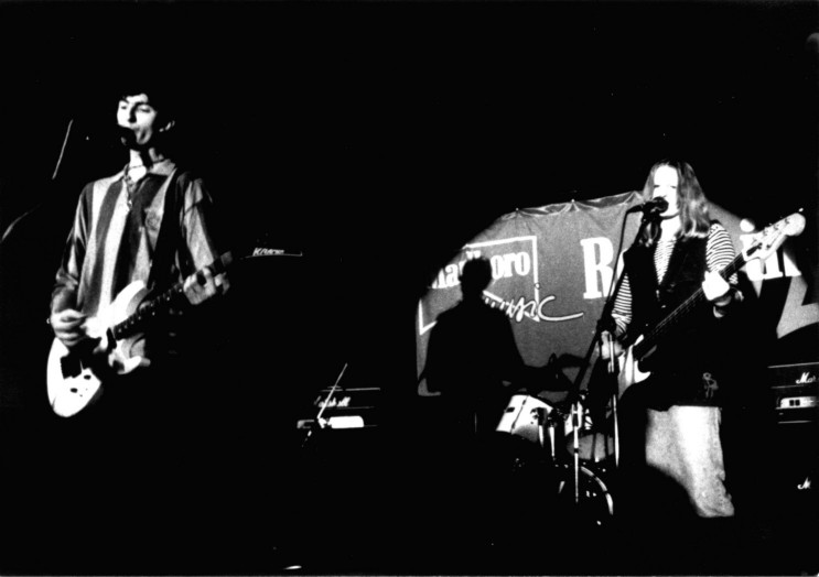 Vystúpenie kapely Queryen na súťaži Marlboro RockIn, 23.2.1995.